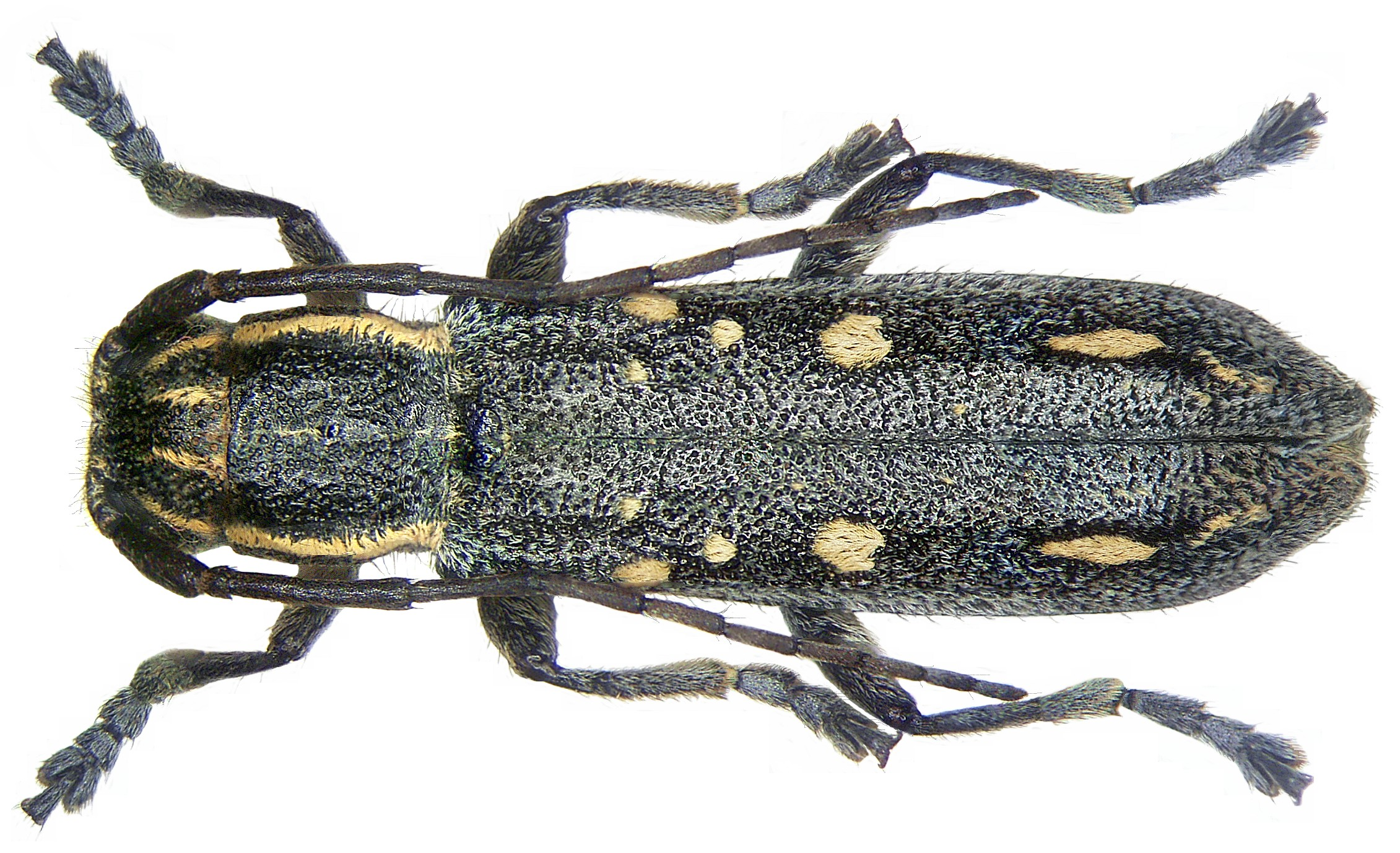 Familie: Cerambycidae Groesse: 13-17 mm Fundort: Türkei, Osmaniye leg. A.Skale, 2002; det. A.Weigel, 2002 Photo: U.Schmidt, 2007